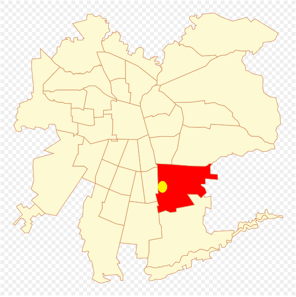 Punto que indica la Poblaciòn Villa O`Higgins en la Comuna de la Florida, en Santiago de Chile